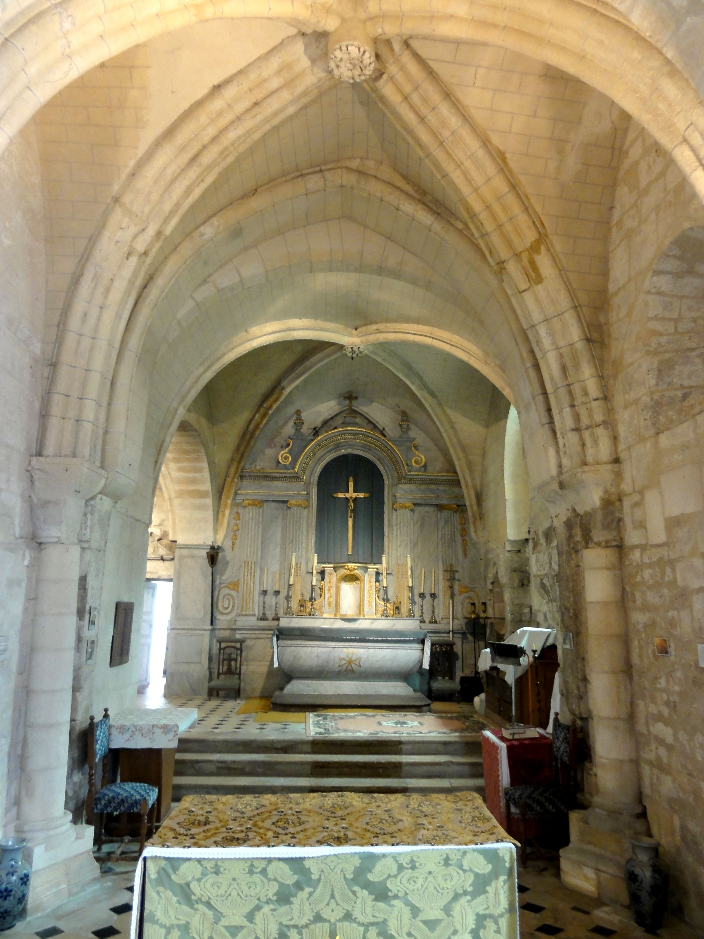 Chœur sud.